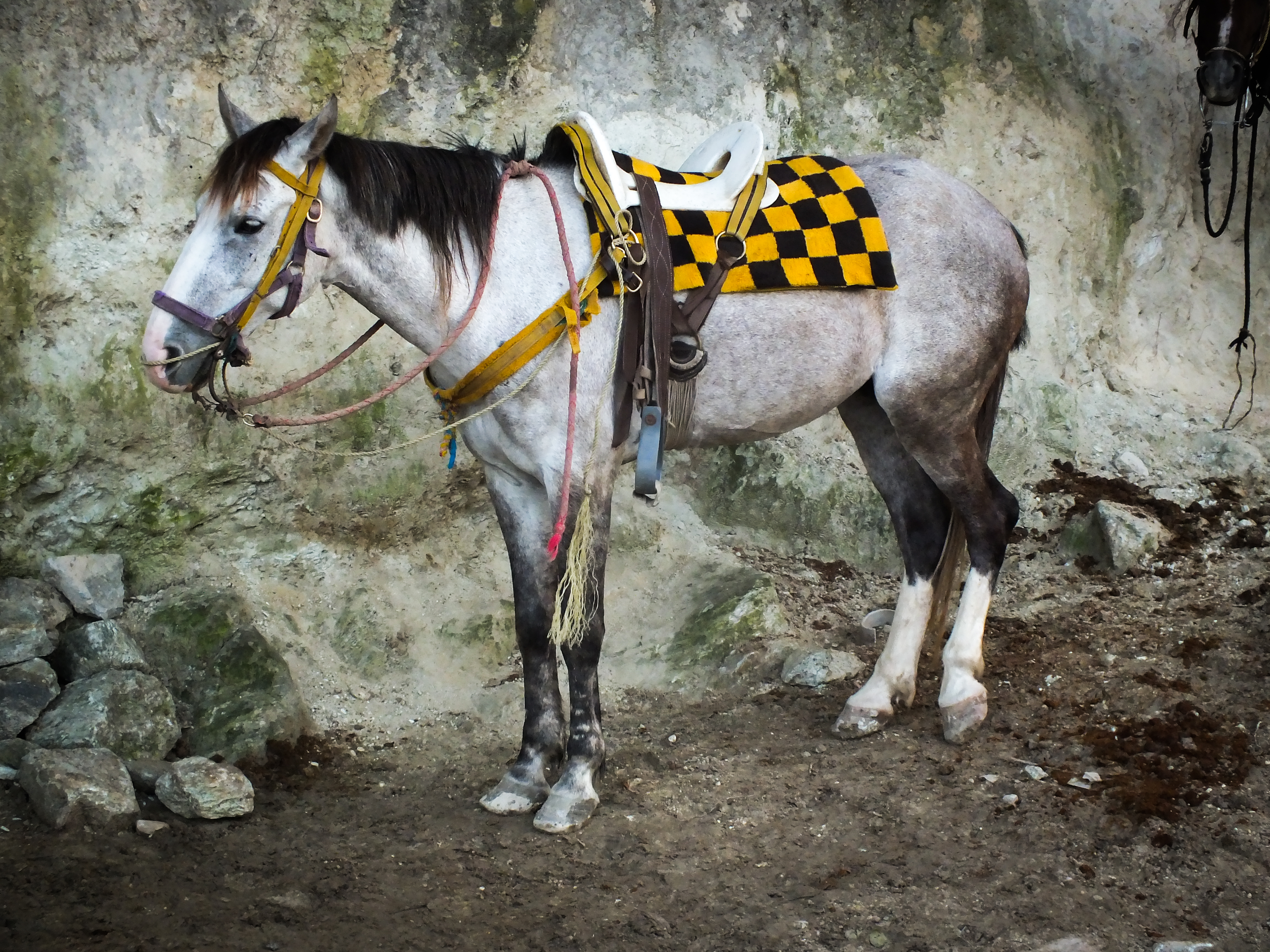 "Burro-taxi", medio de transporte en Galipán, Caracas.